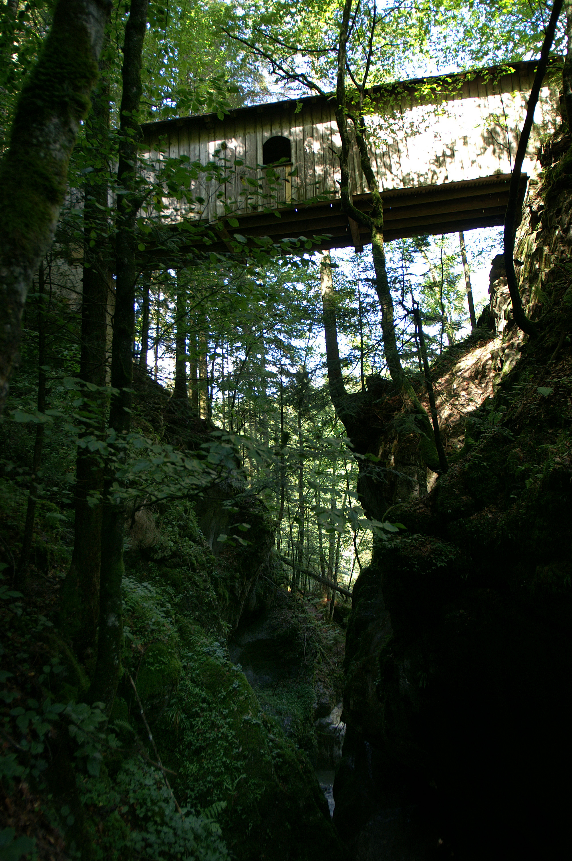 Die Kobelach verläuft parallel zur Rappenlochschlucht in Dornbirn und wird zum Canyoning begangen. Im Bild die gedeckte Amannbrücke im Buchenwald.